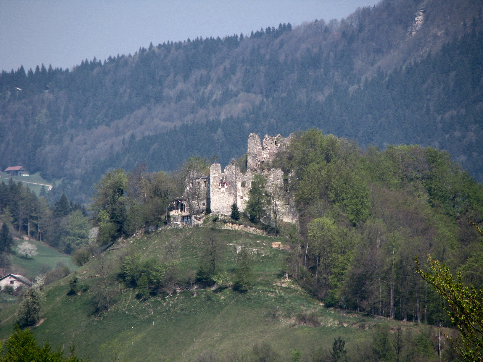 Ostanki gradu Gamberk